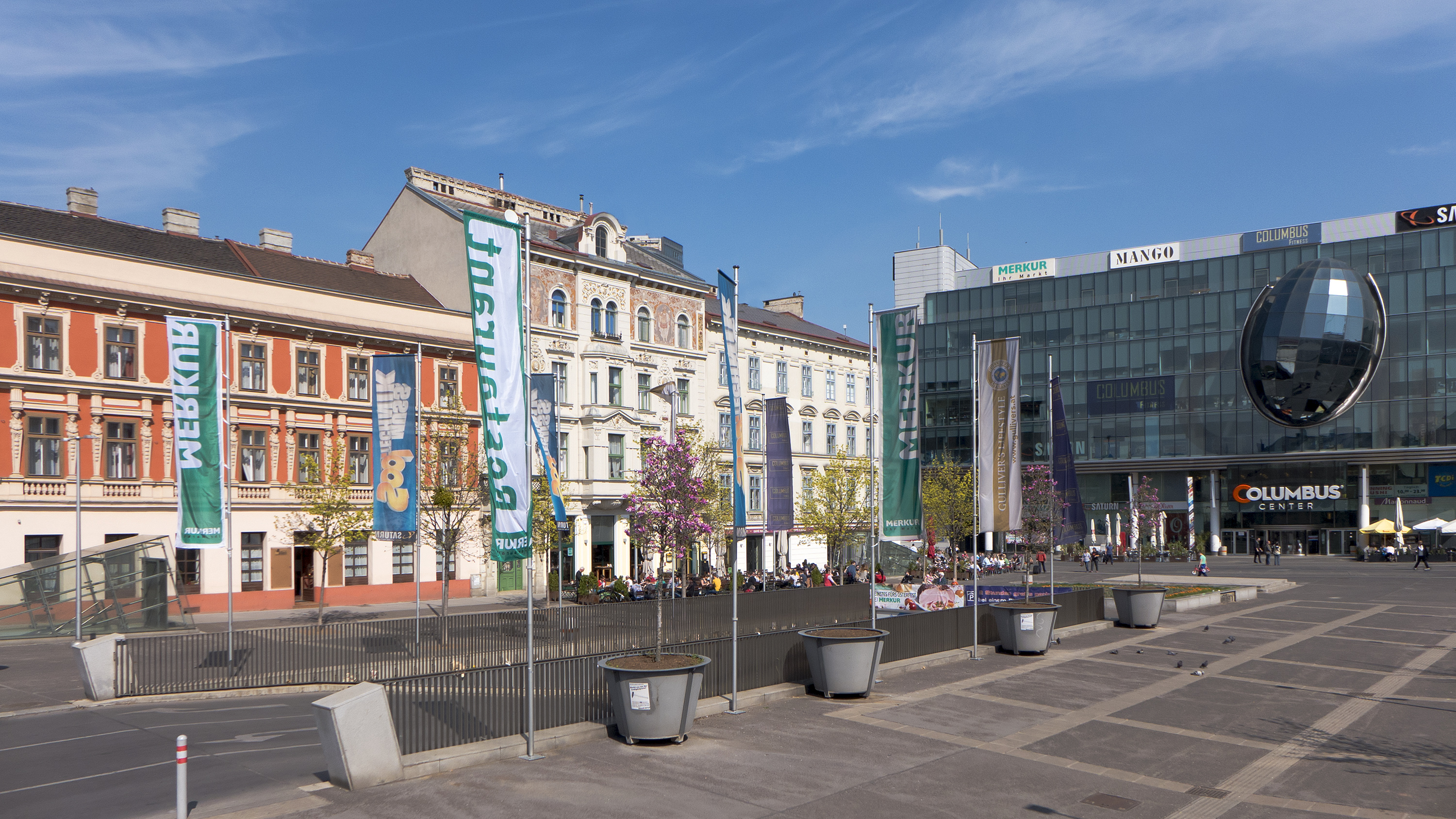 Columbusplatz in Wien 10 Richtung Nordosten